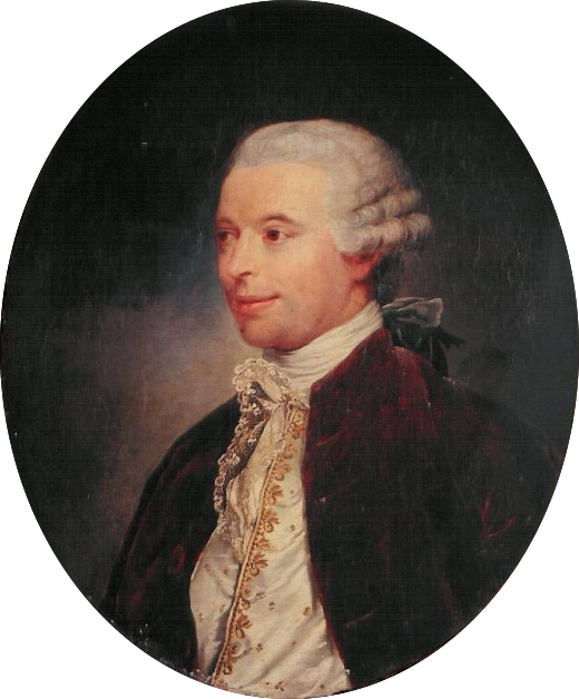 Estampe LOUIS DUTENS - NE A TOURS LE 15 JANVIER 1730 - MORT A LONDRES EN 1812